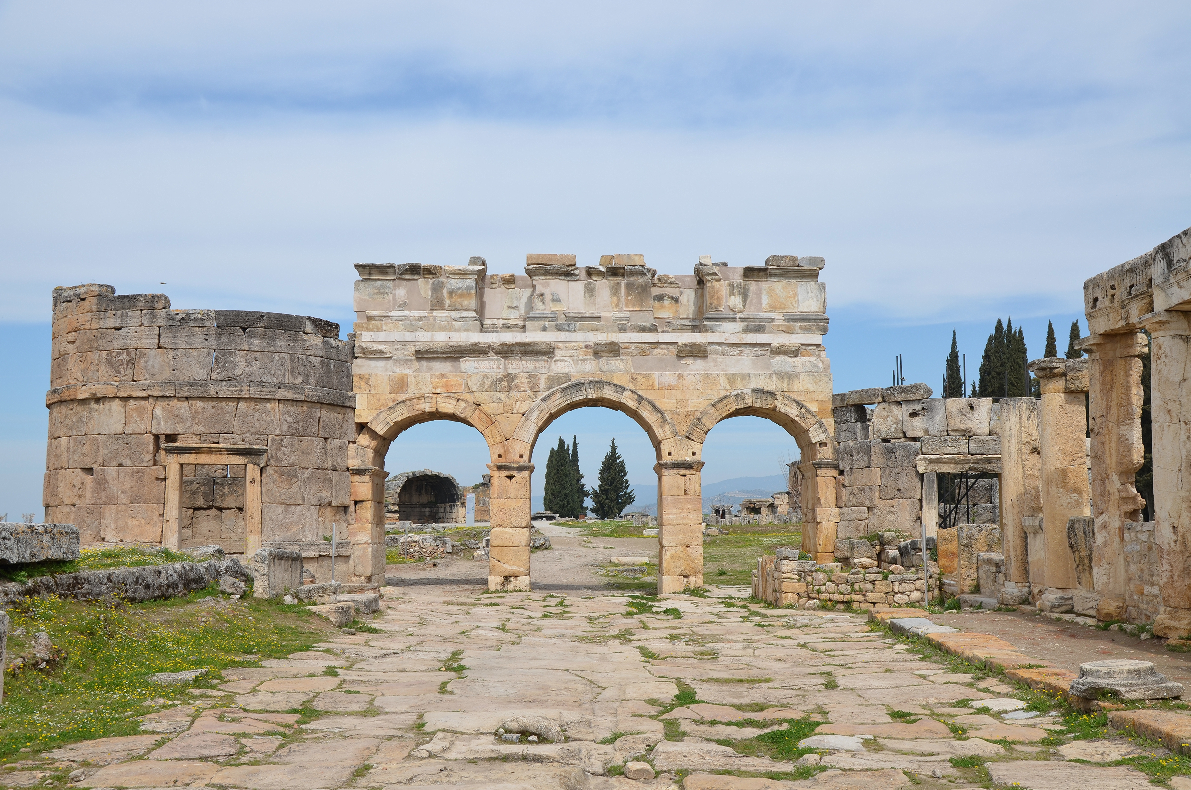 Hierapolis, Turkey